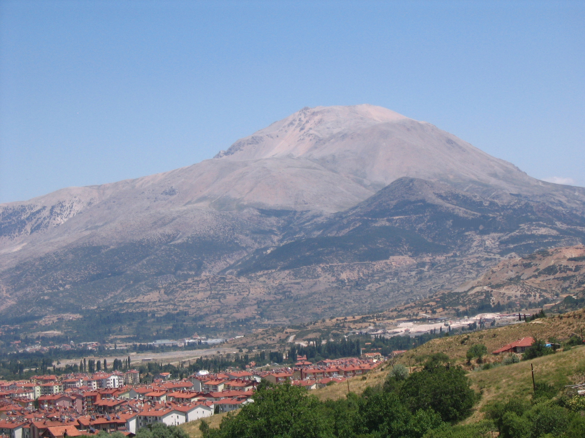 Davraz Dağı, 2397m hoher Berg in der Provinz Isparta im Südwesten der Türkei